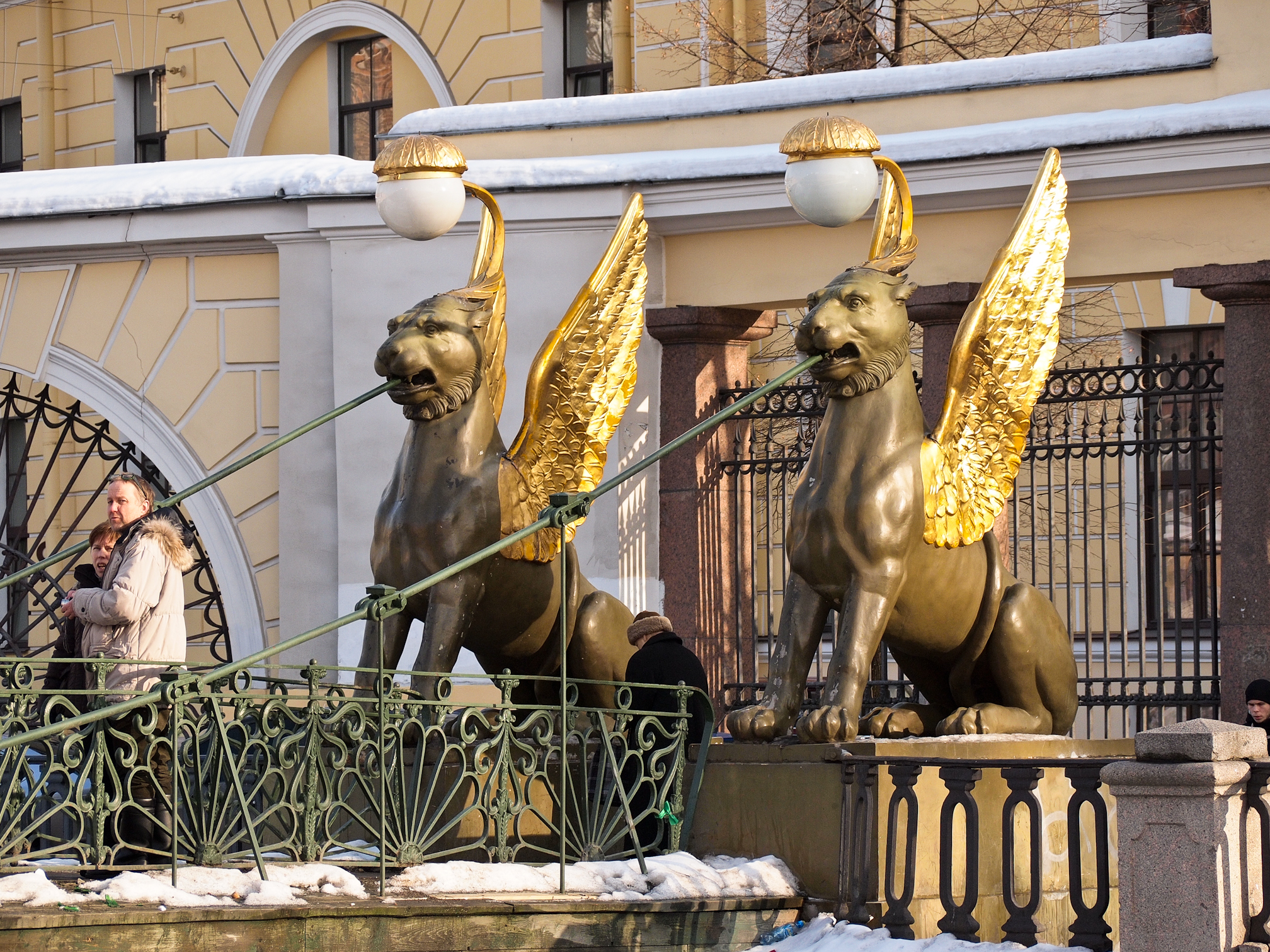 Грифоны на Банковском мосту